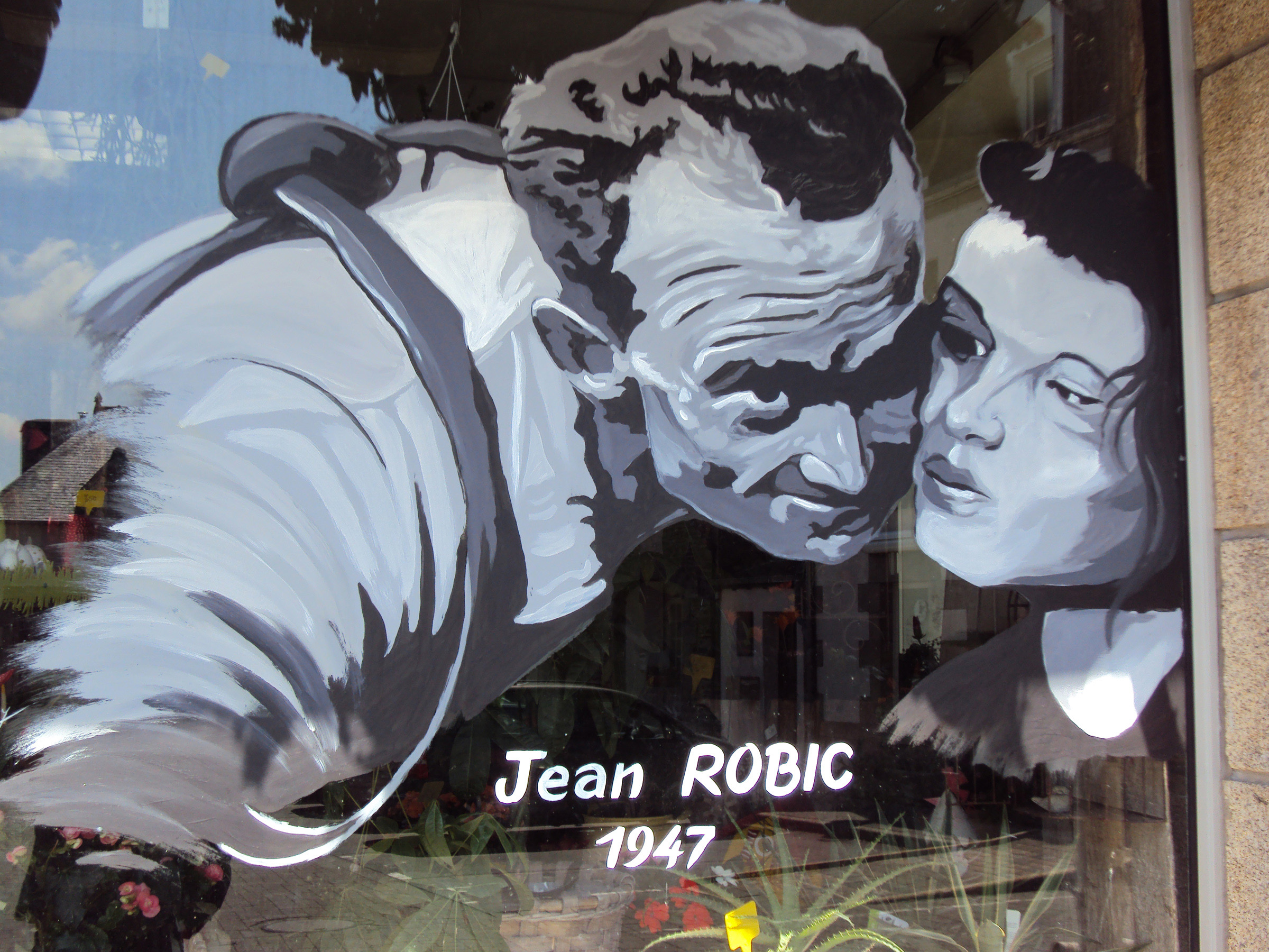 Peinture représentant le cycliste Jean-Robic à Mur-de-Bretagne peu après le passage d'une étape du Tour de France Vélo 2011